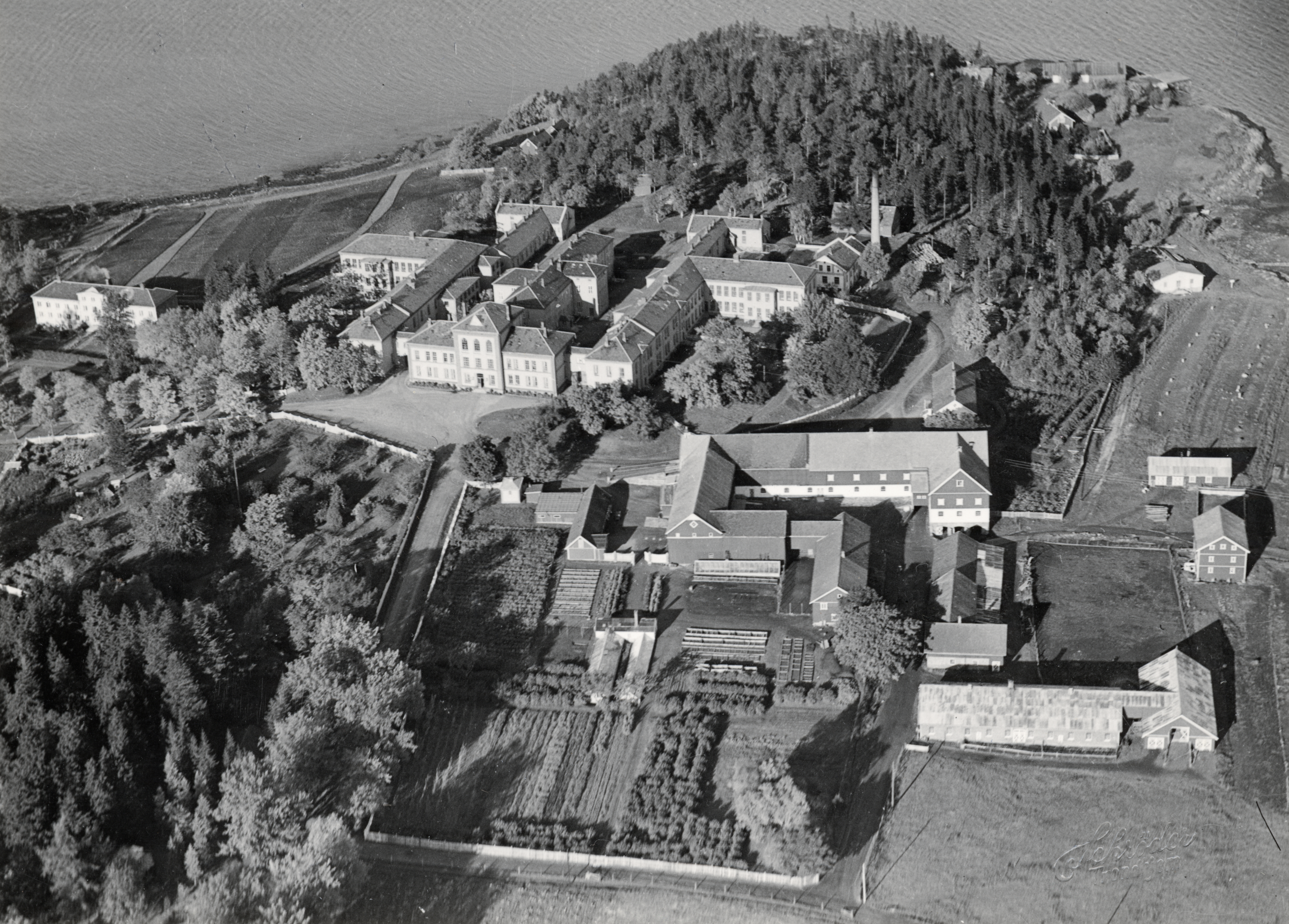 Rotvoll nedre, Rotvoll sinnsykehus i Strinda, Sør-Trøndelag Oversikt